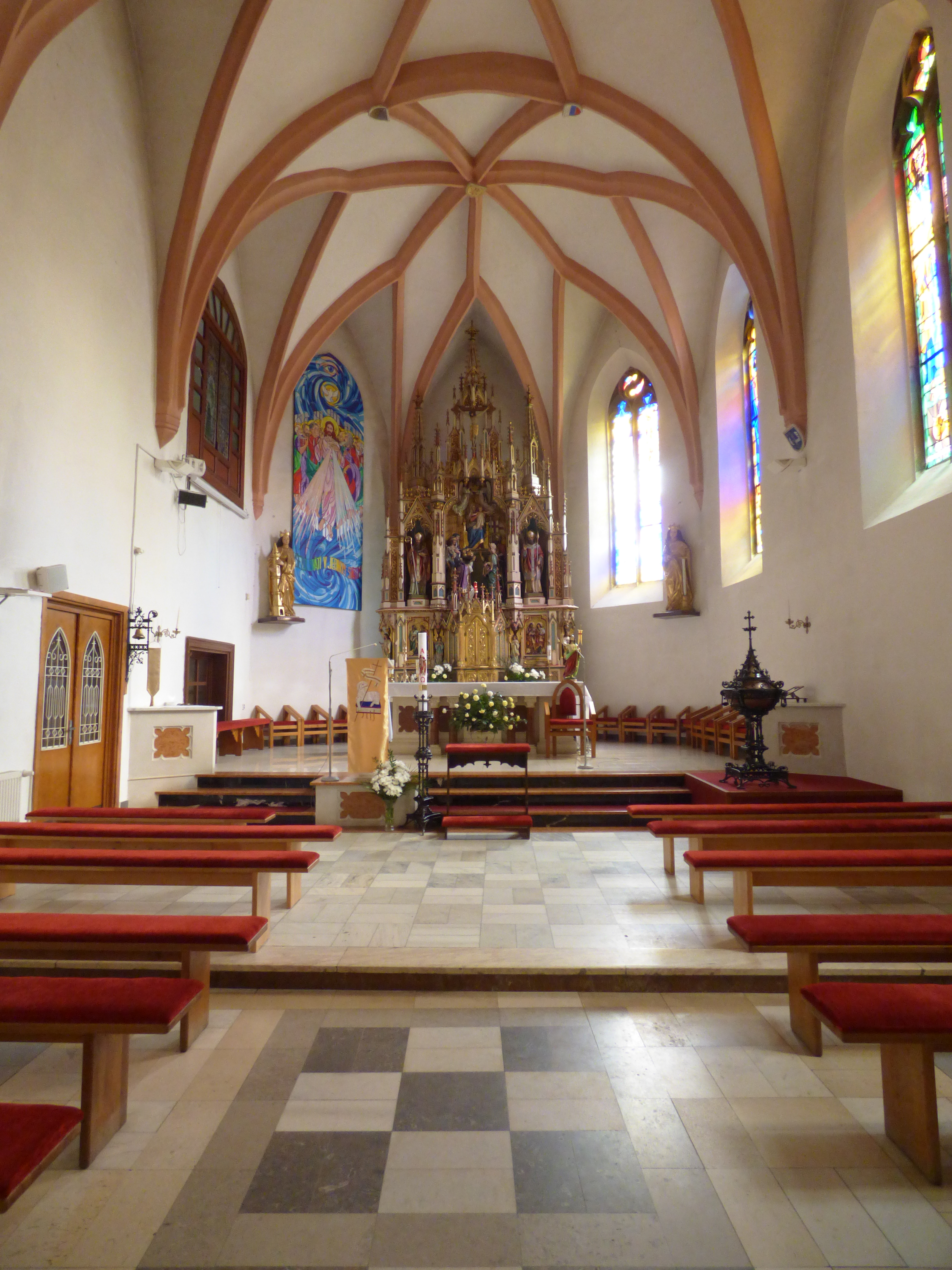 Hlavný oltár v sanktuáriu